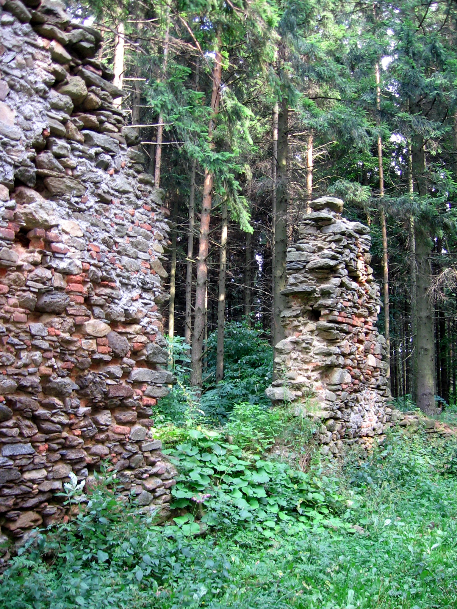 Zřícenina nad Úsobím